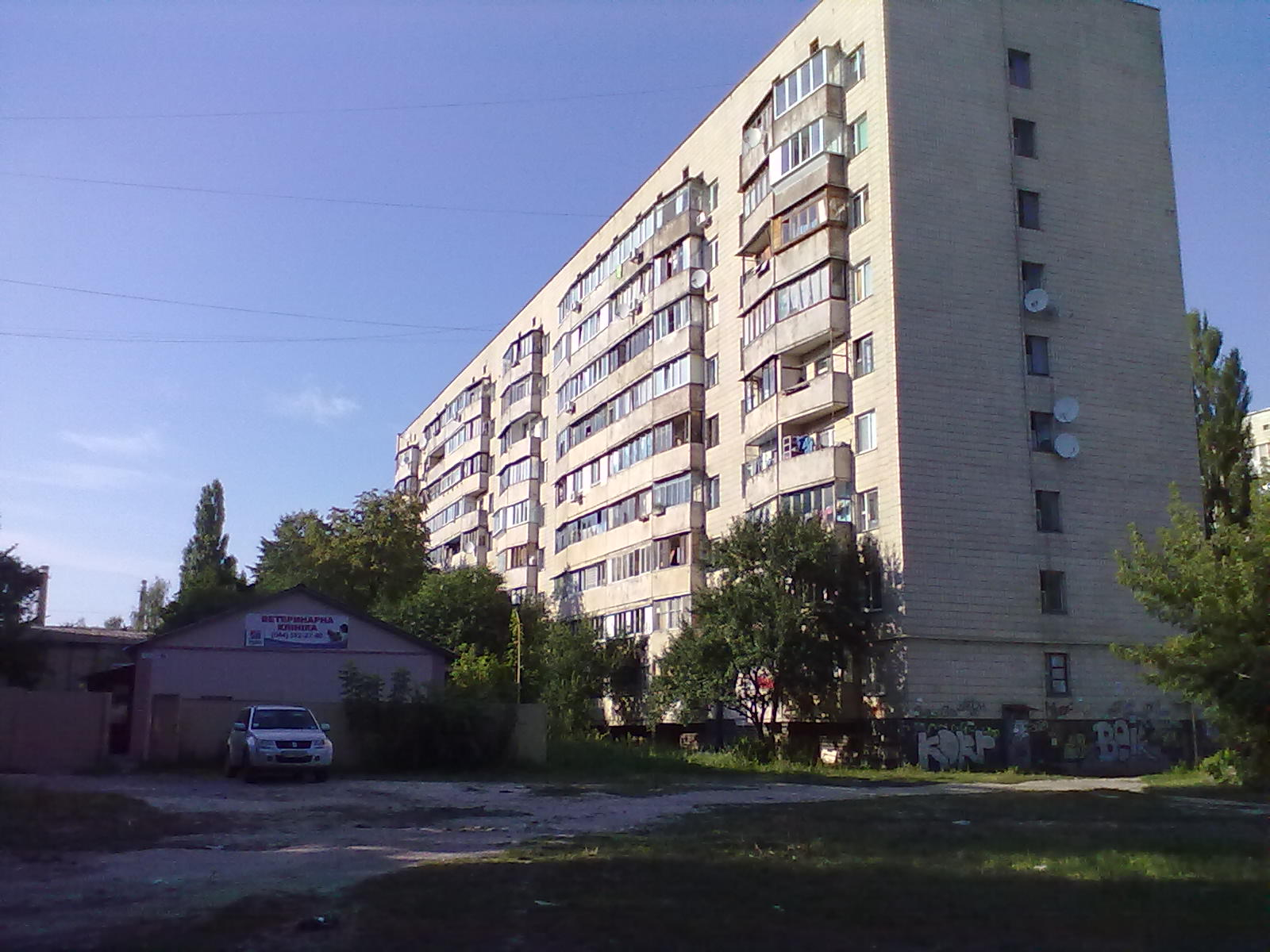 жилой дом у школы № 67 по ул. Героев Севастополя, Киев